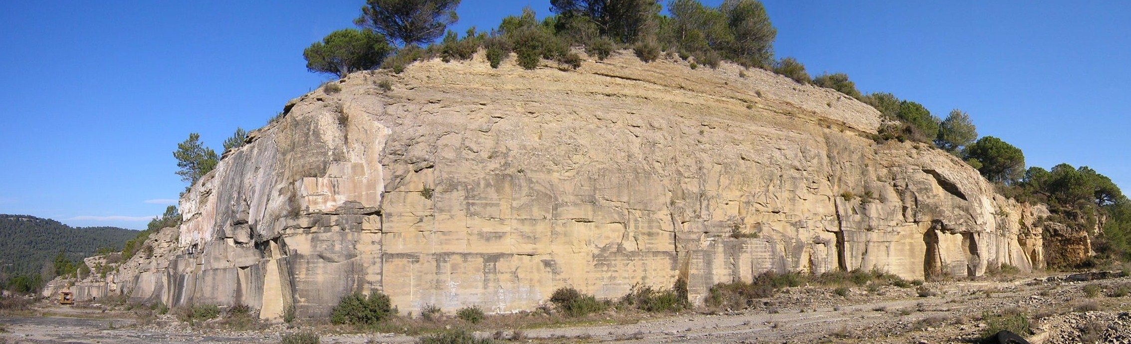 Panoràmica de la Pedrera de Coll Girant (Monistrol de Calders, Moianès)